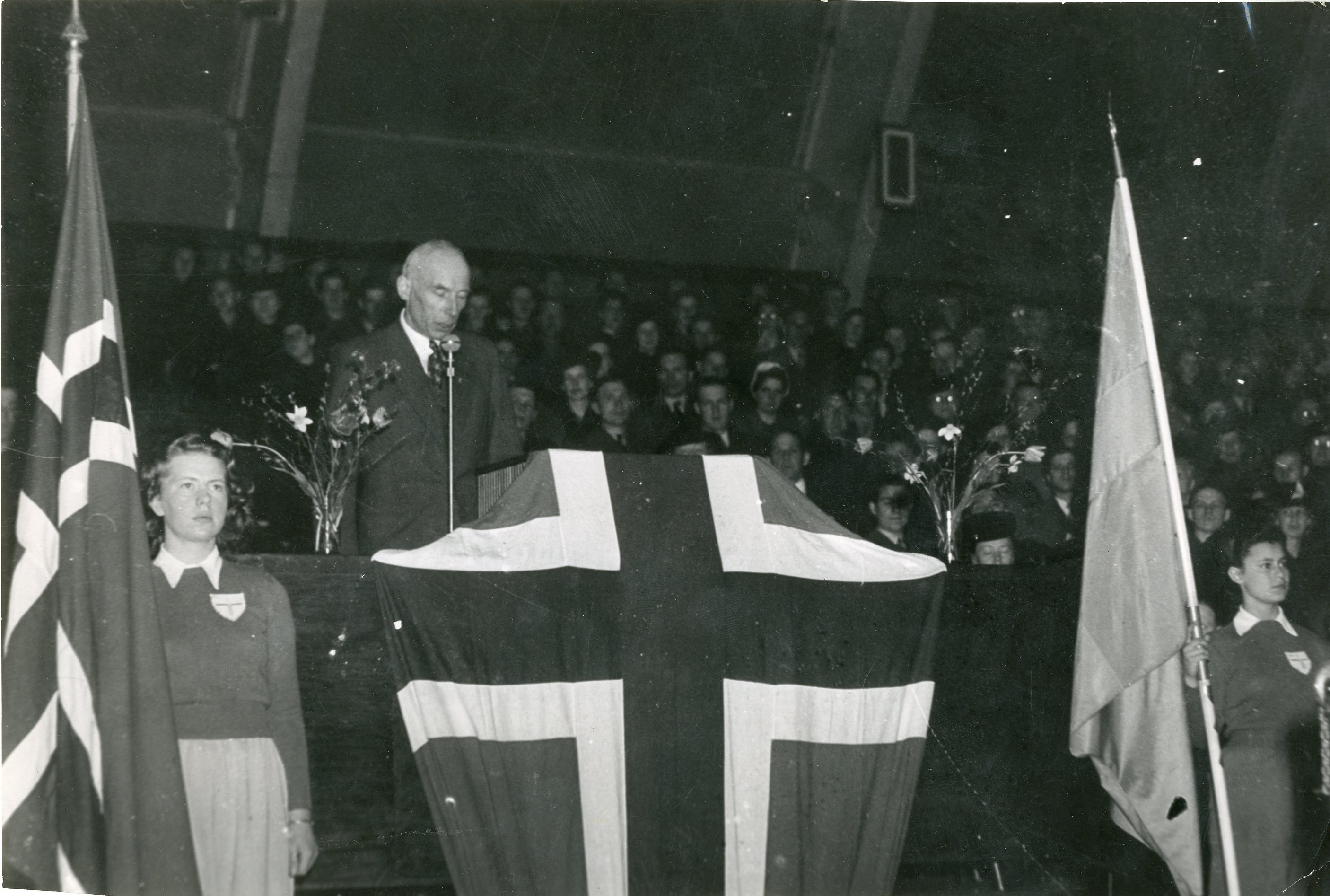 Den svenske idretts hyldest til Norge i Alvikshallen i Stockholm i april 1943. Torsten Tegner taler RA/PA-1209/Uc/71/4/ S 1009